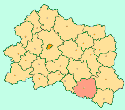 Orel Oblast map by Al Silonov Карта районов Орловской области